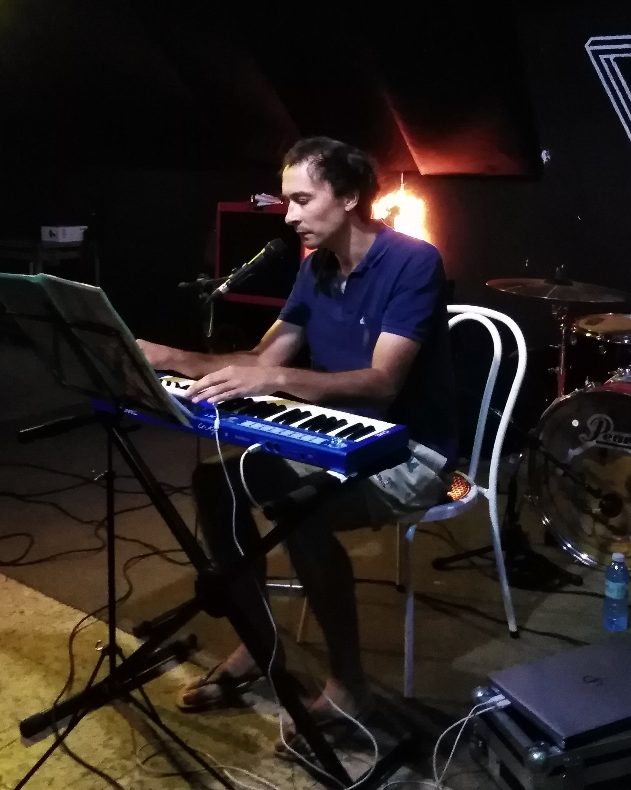 concerto de Emilio José no Liceo Mutante